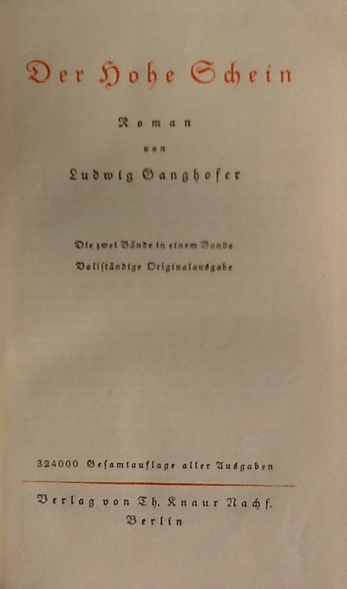 Titelseite des Buches in einer Ausgabe aus dem Jahre 1936